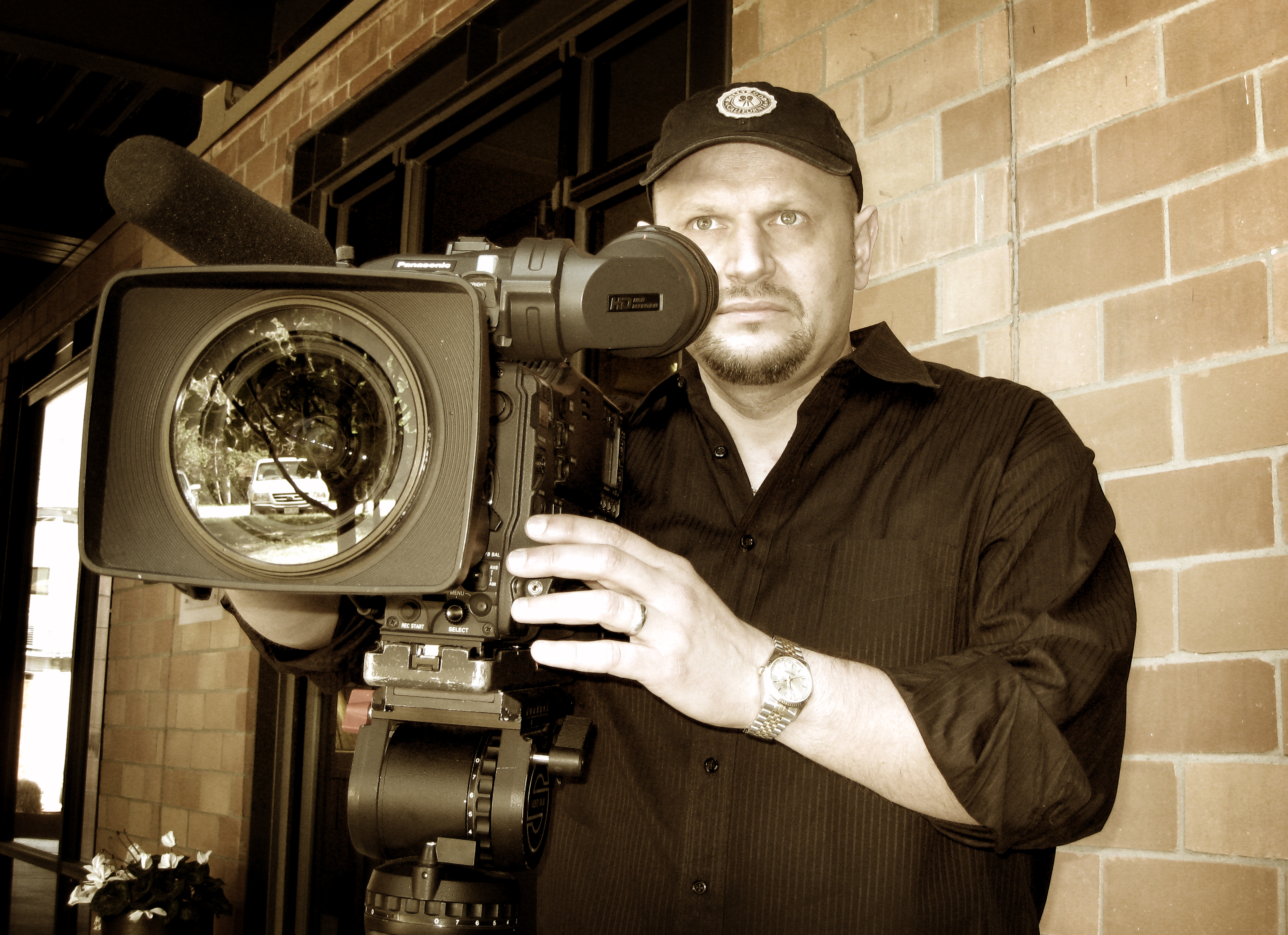 Mariusz Kotowski